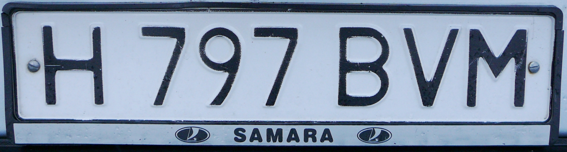 Казахстанский автомобильный номер выданный на физическое лицо. Номер "H797BVM". Буква "H" - перед цифрами обозначает "Жамбылская область".